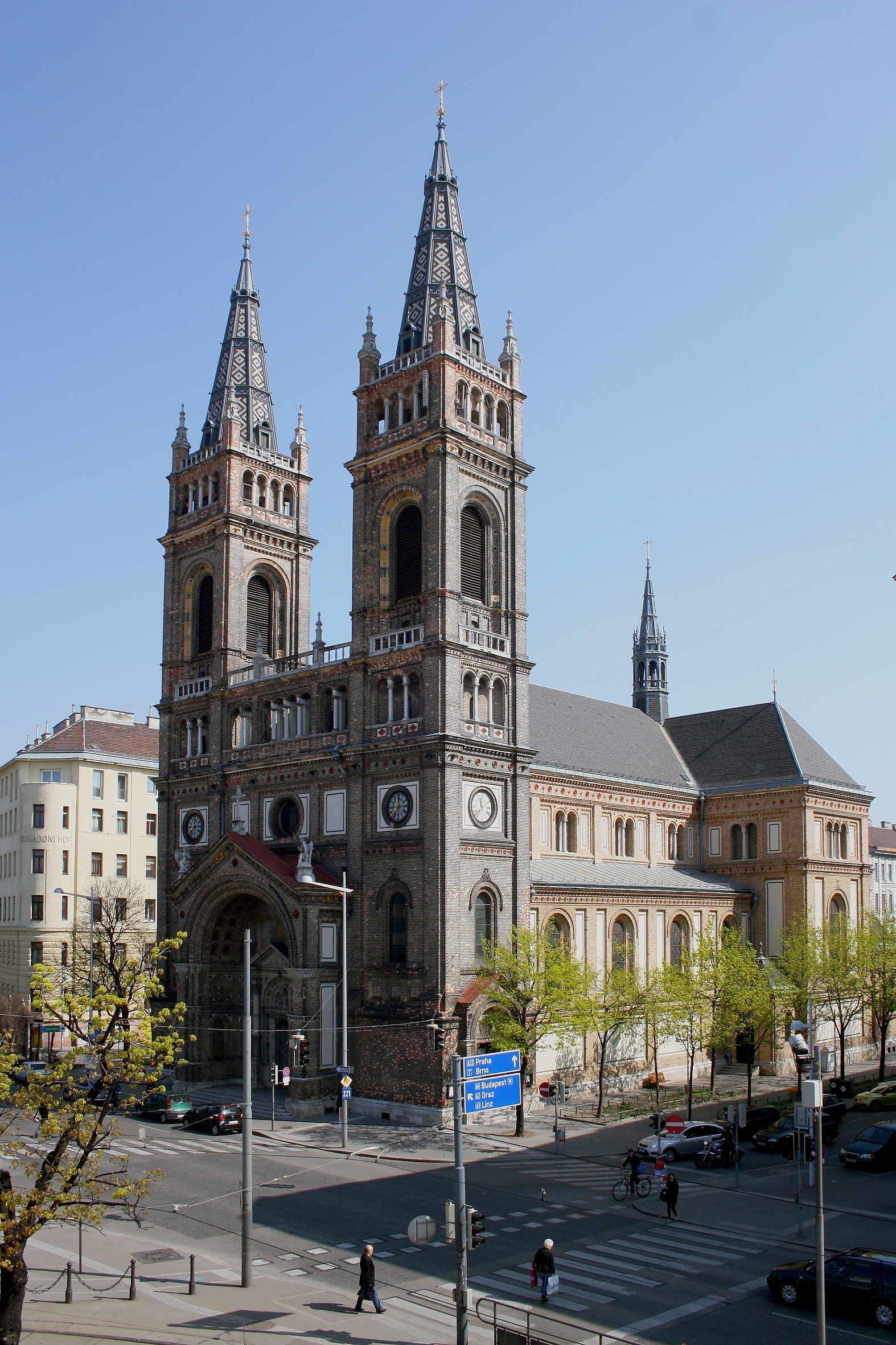 Südwestansicht der Pfarrkirche „Zum hl. Franziskus Seraphikus“ in Breitenfeld, ein Bezirksteil des 8. Wiener Gemeindebezirkes Josefstadt.1840 wurde zwecks Bau einer Kirche ein Kirchenbauverein gegründet. Nach einer Ausschreibung im Jahr 1852 kam es 1886 abermals zu einer Ausschreibung. Als Sieger ging der Architekt Alexander Wielemans hervor. Erst nach weiteren 8 Jahren kam es endlich 1894 zur Grundsteinlegung. Vier Jahre später, am 18. Juni 1898, wurde die im Stil der italienischen Frührenaissance errichtete Kirche feierlich geweiht.